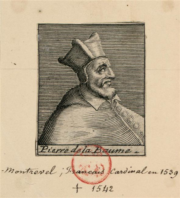 Pierre de La Baume (1477-1544), cardinal en 1539